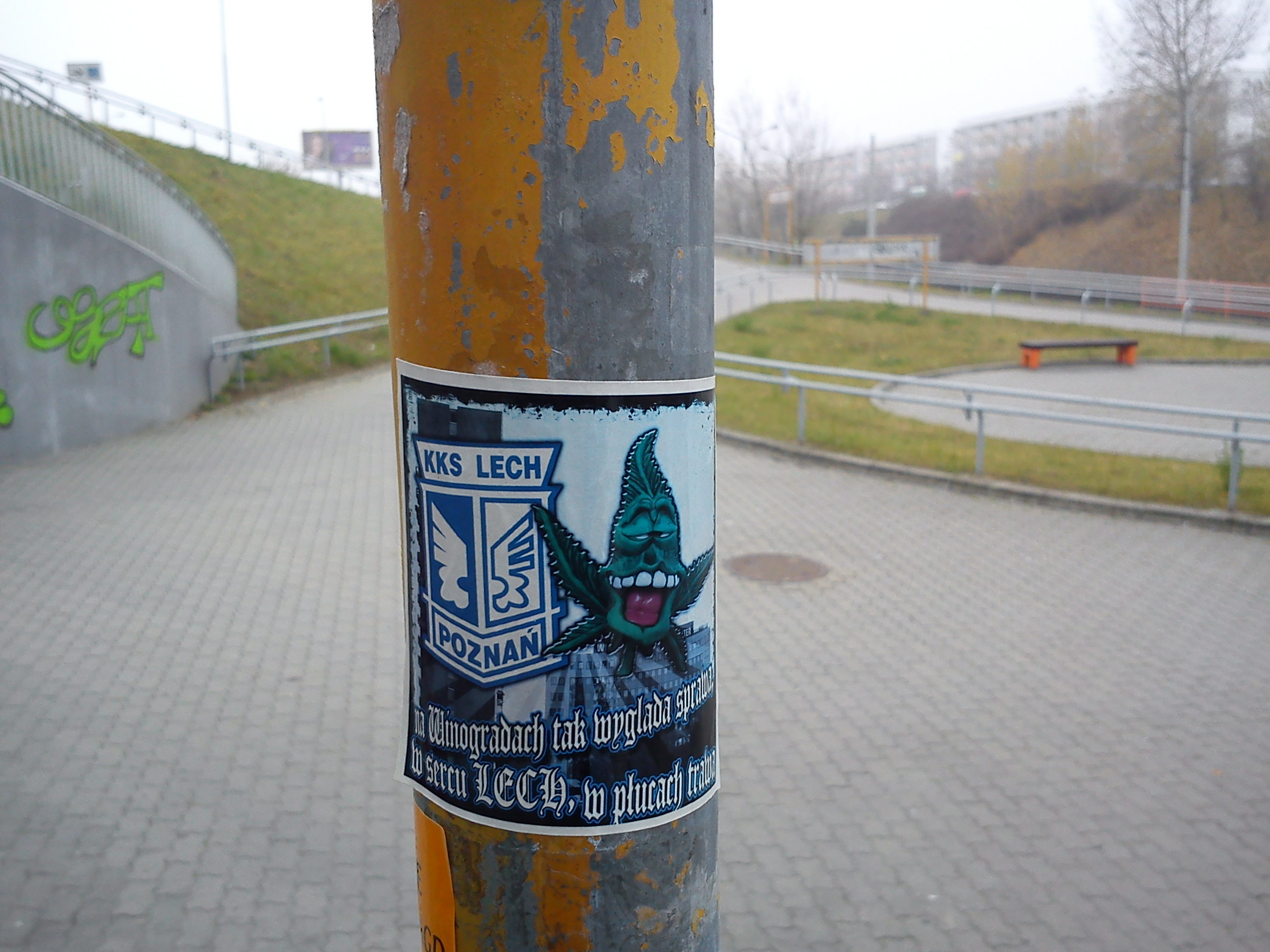 PST station Kurpińskiego, Poznań.